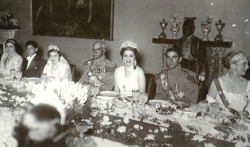 Banquet à l'ambassade d'Egypte à Téhéran lors du mariage de Fawzia Fuad et de Mohammad Reza Pahlavi, le 25 avril 1939